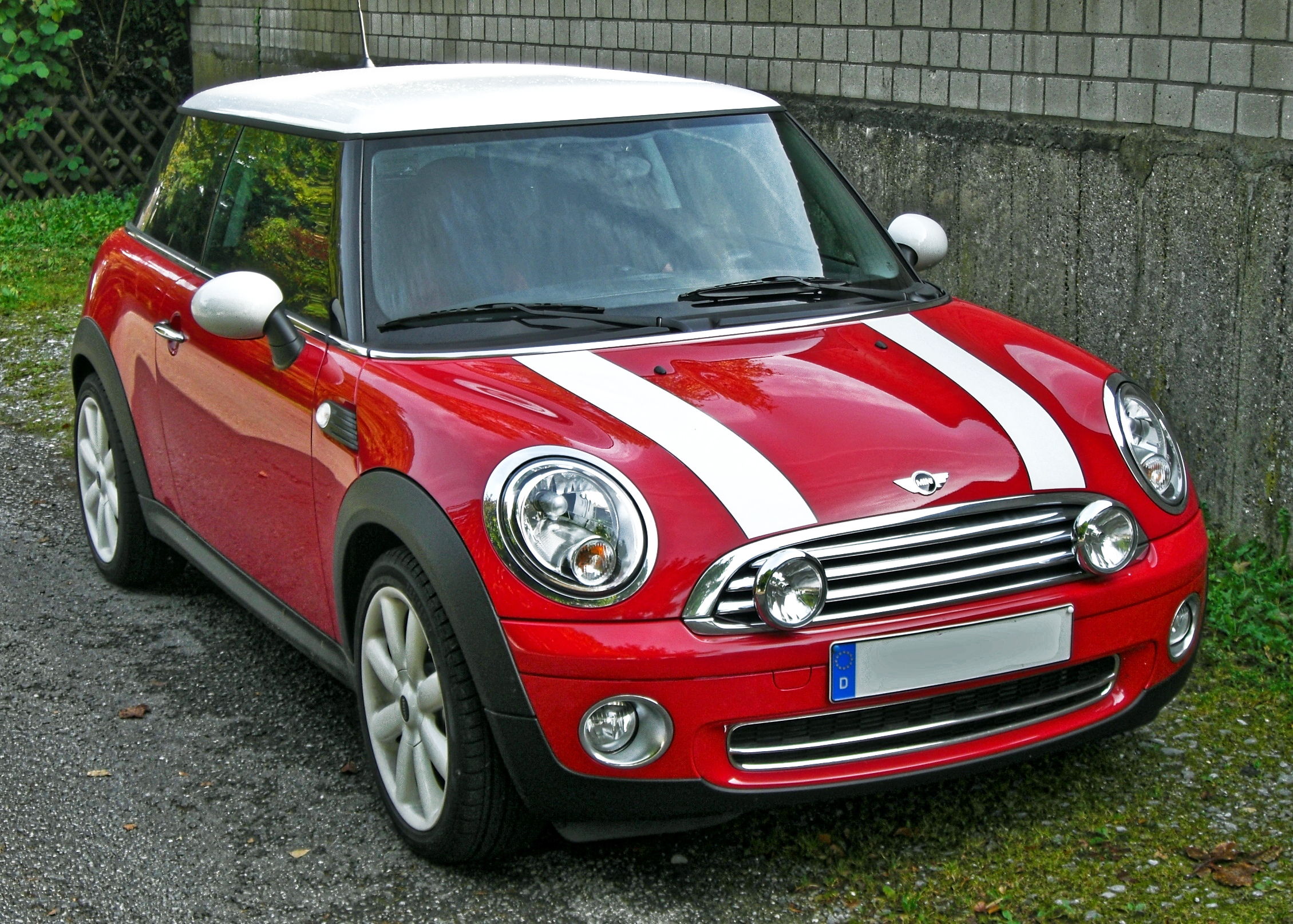 BMW Mini Cooper